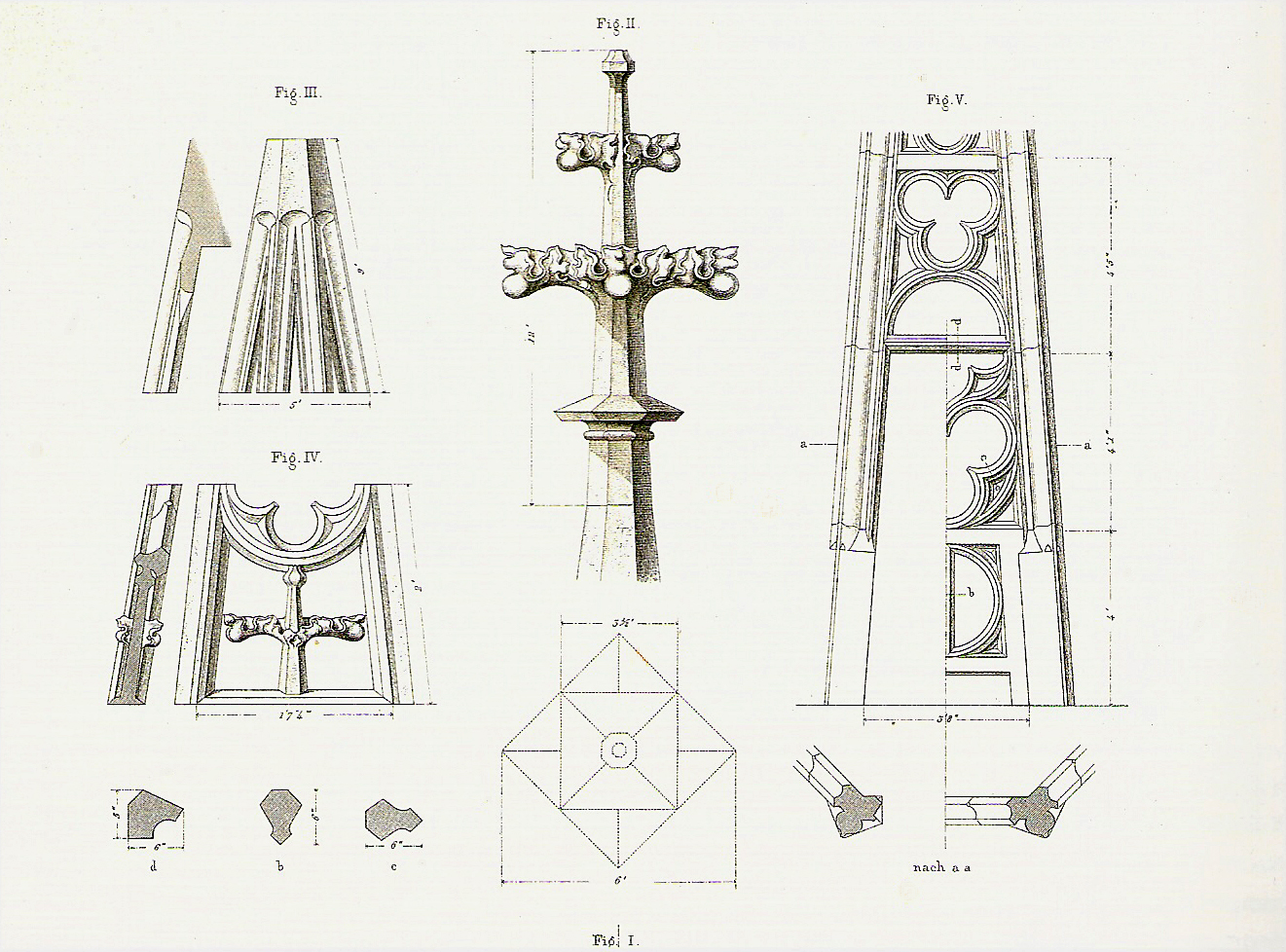 Das Buch Die Kunst des Mittelalters in Schwaben. 6. Lieferung. Die Cisterzienserabtei im Schönbuch, Stuttgart 1858, Buch 22,0 × 32,5 cm; (Tafel-Nr. nicht angegeben) Illustration mit architektonischen Details (Maßwerk) des Klosters Bebenhausen